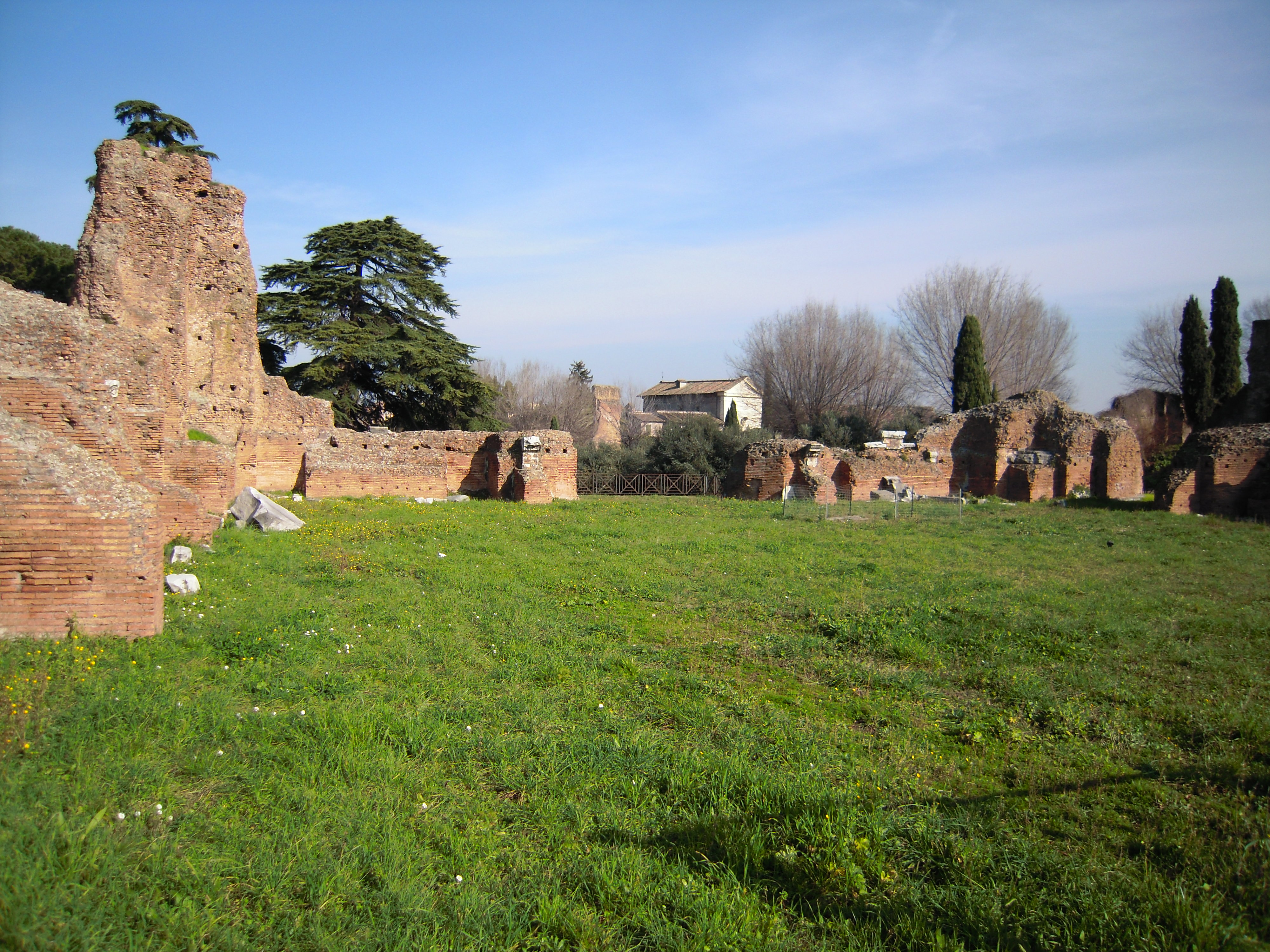 Aula regia, Palazzi imperiali sul Palatino